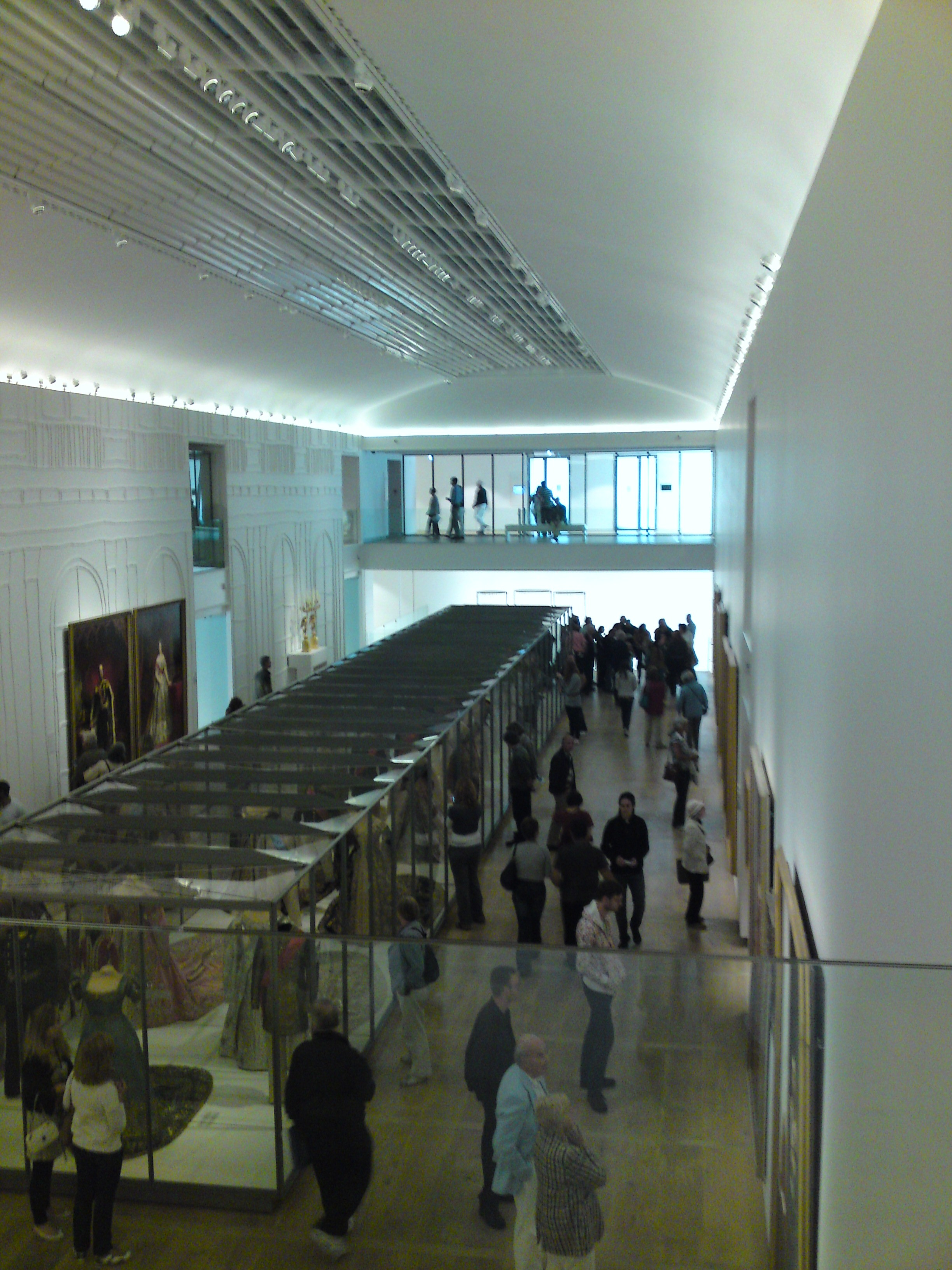 Keizersvleugel (vleugel aan de kant van de Nieuwe Keizersgracht) van de Amsterdamse Hermitage op 20 juni 2009. Op dit moment ingericht als Troonzaal in het kader van de tentoonstelling "Aan het Russische hof"